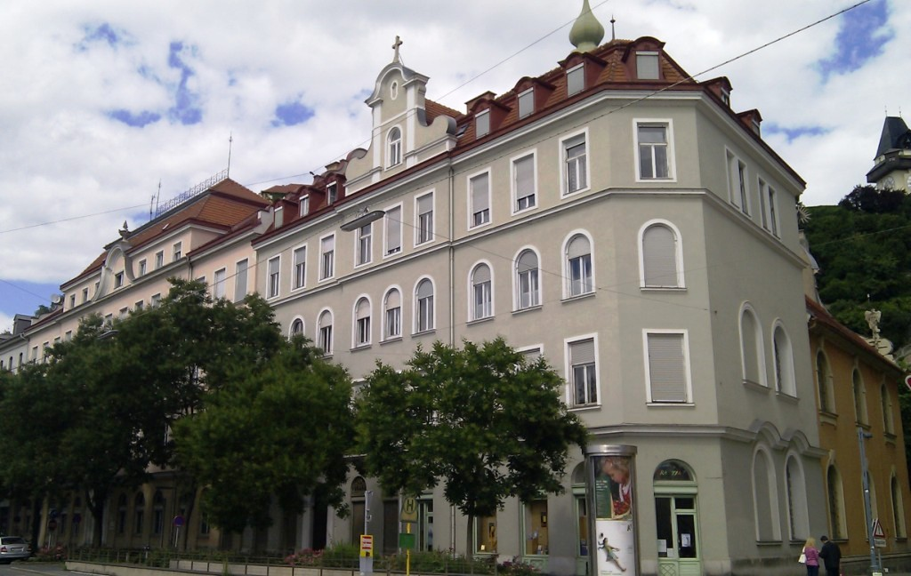 Kloster und Schule der Schulschwestern, Kaiser-Franz-Josef-Kai, 14-18, Graz